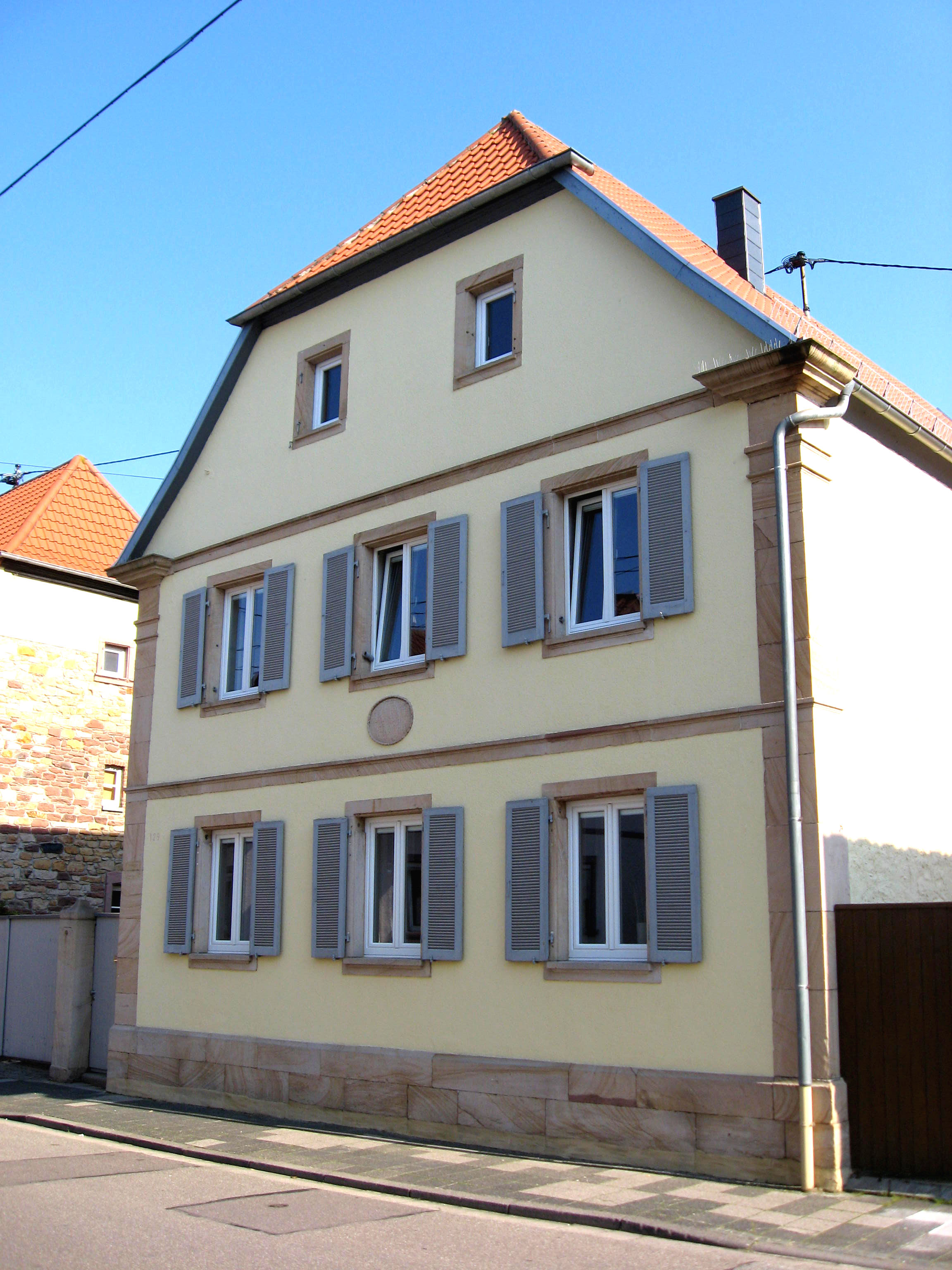 Wohnhaus Hauptstraße 129 in Queichheim, bezeichnet 1829